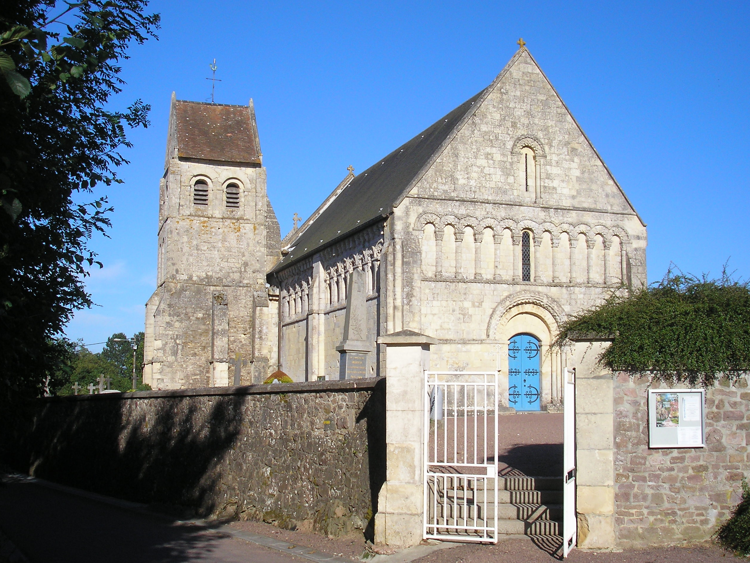 Mouen (Normandie, France). L'église Saint-Malo.